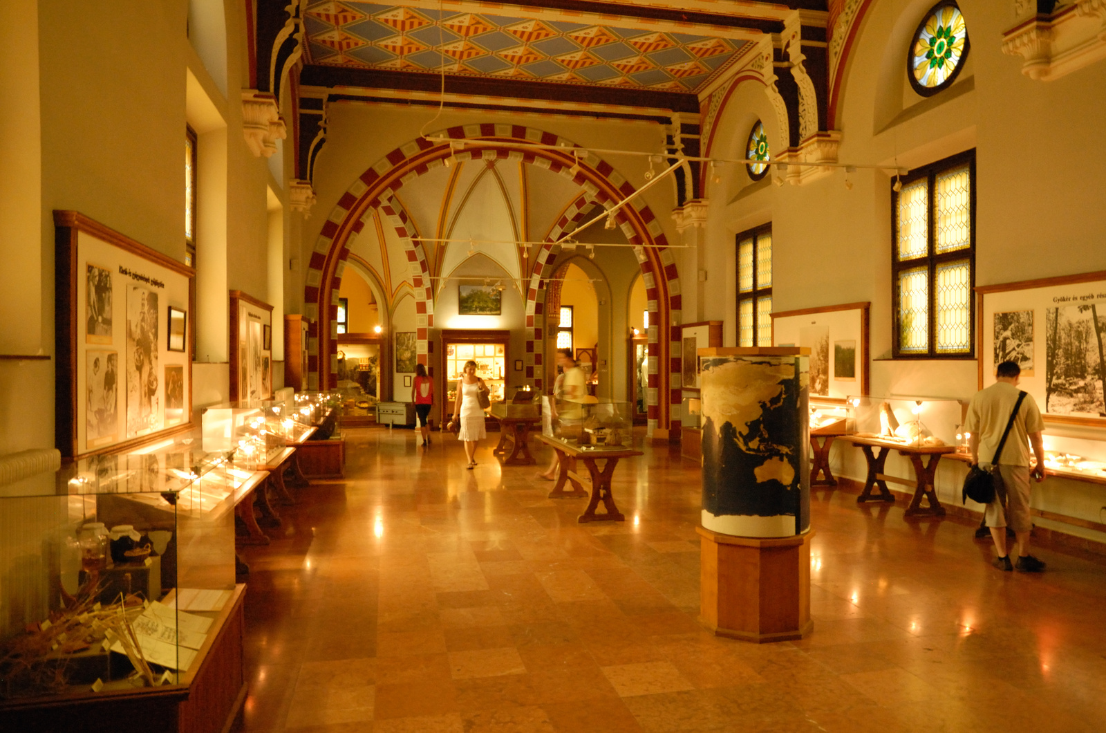 Mezőgazdasági Múzeum (Budapest 14, Városliget)